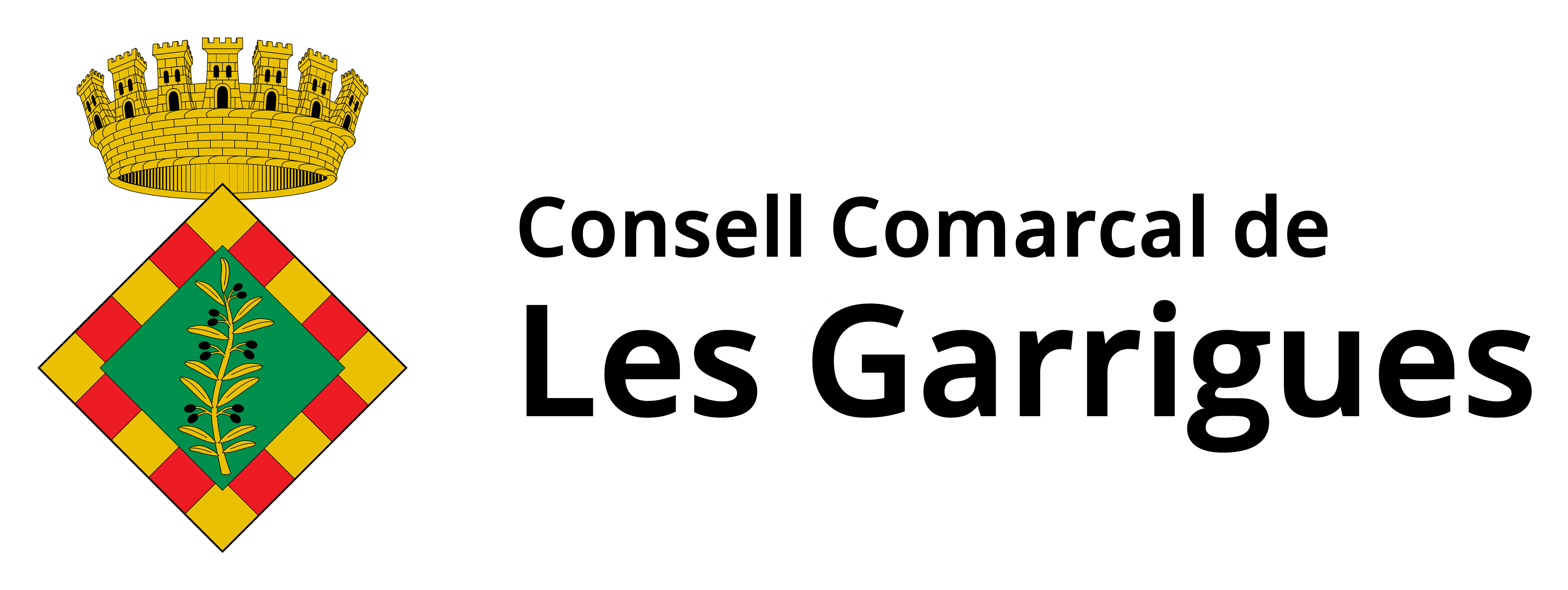 Logotipo del Consell Comarcal de Les Garrigues